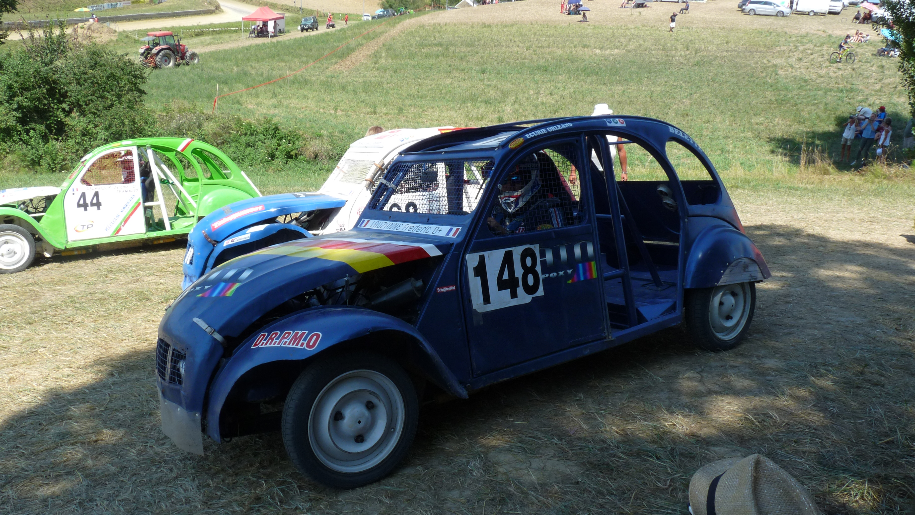 Une voiture de 2cv cross en 2018. (Salvagnac)